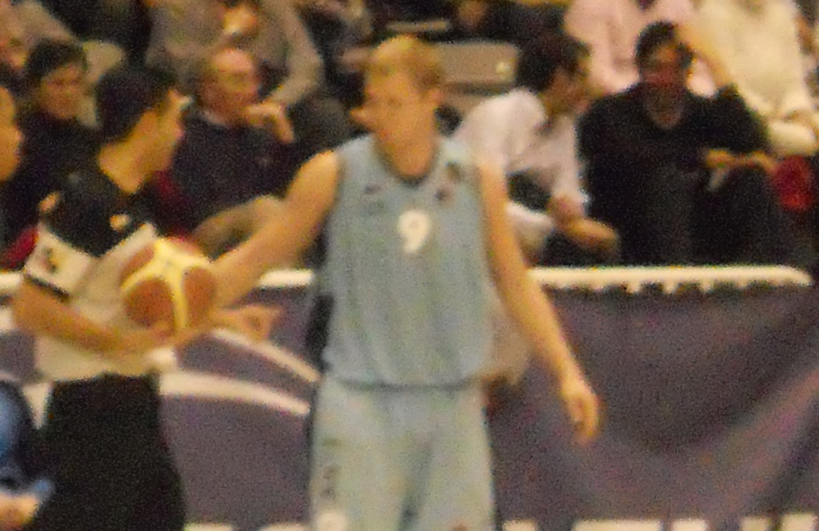 Fotografía do xogador de baloncesto Joe Krabbenhoft no Pazo dos Deportes de Lugo.